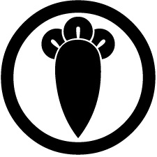 丁子もモチーフにした日本固有の家紋です。